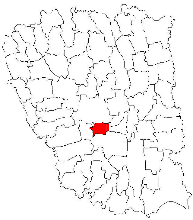 Categorie:Hărţi ale judeţului Galaţi